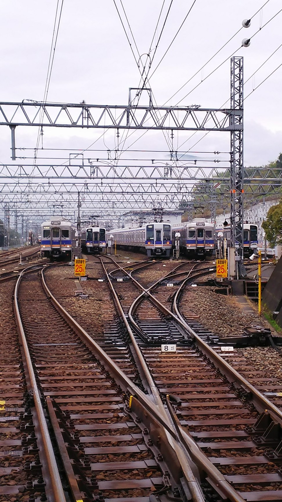 小原田信号所車庫線